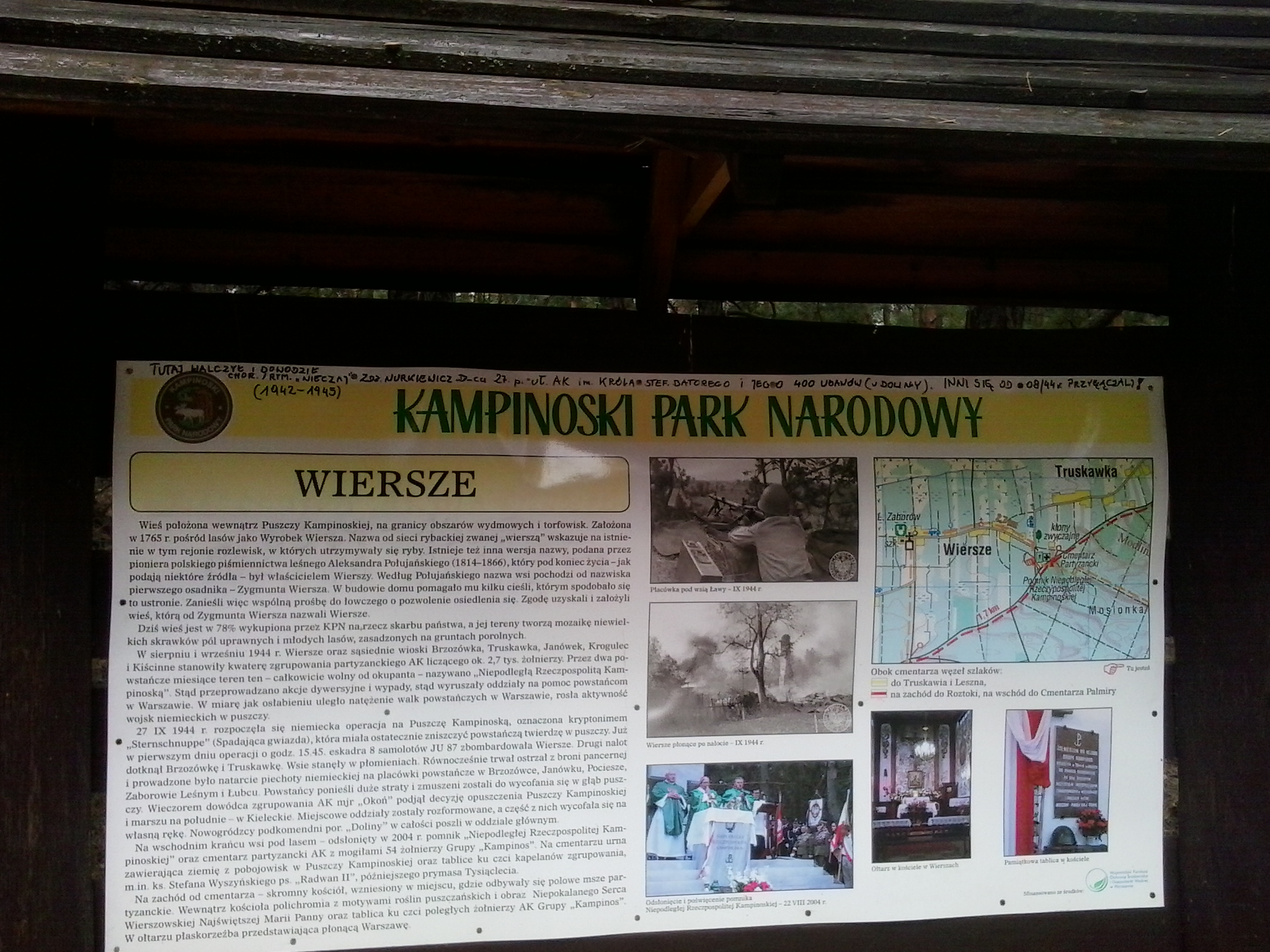 miejsce pochówku por. Antoniego Chomicza "Stabrawa"